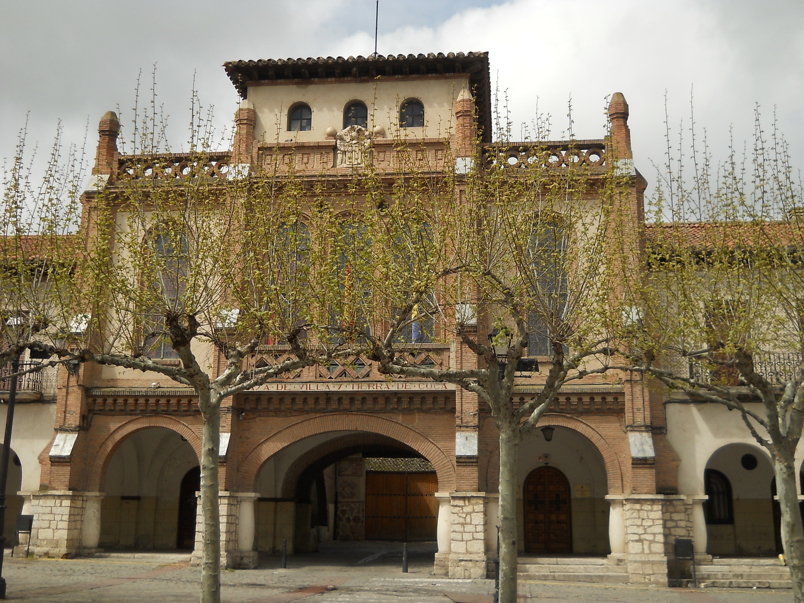 Municipio, Coca, Segovia, Spagna